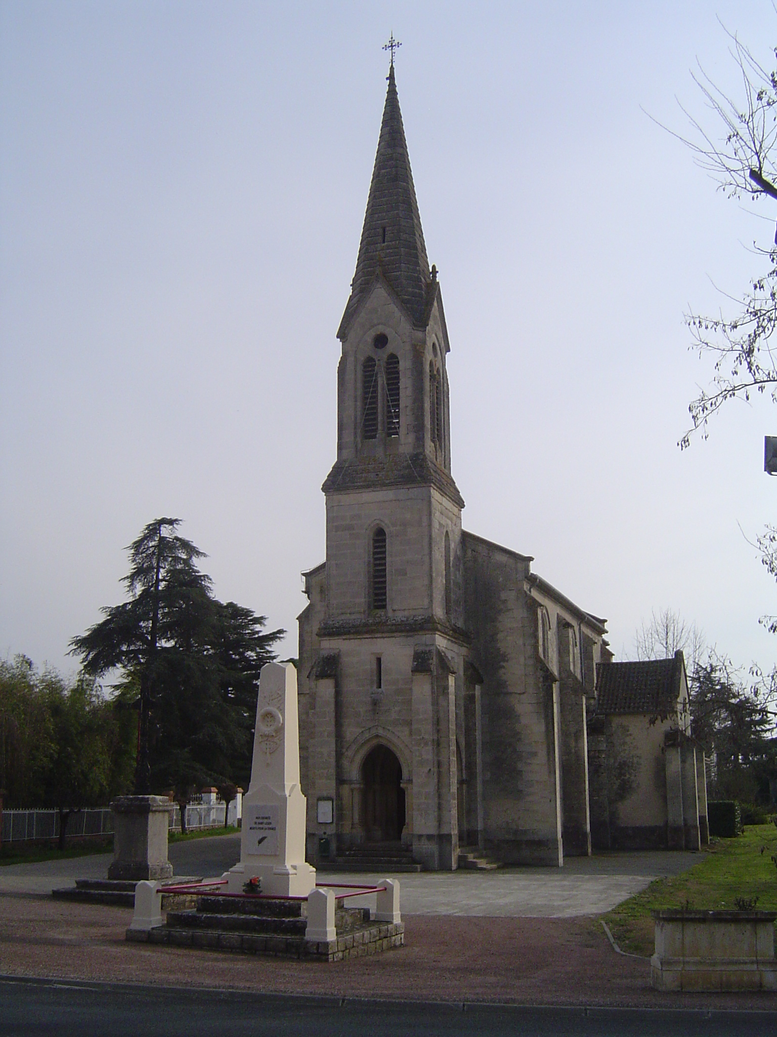 Vue sur l'église de Saint Léger